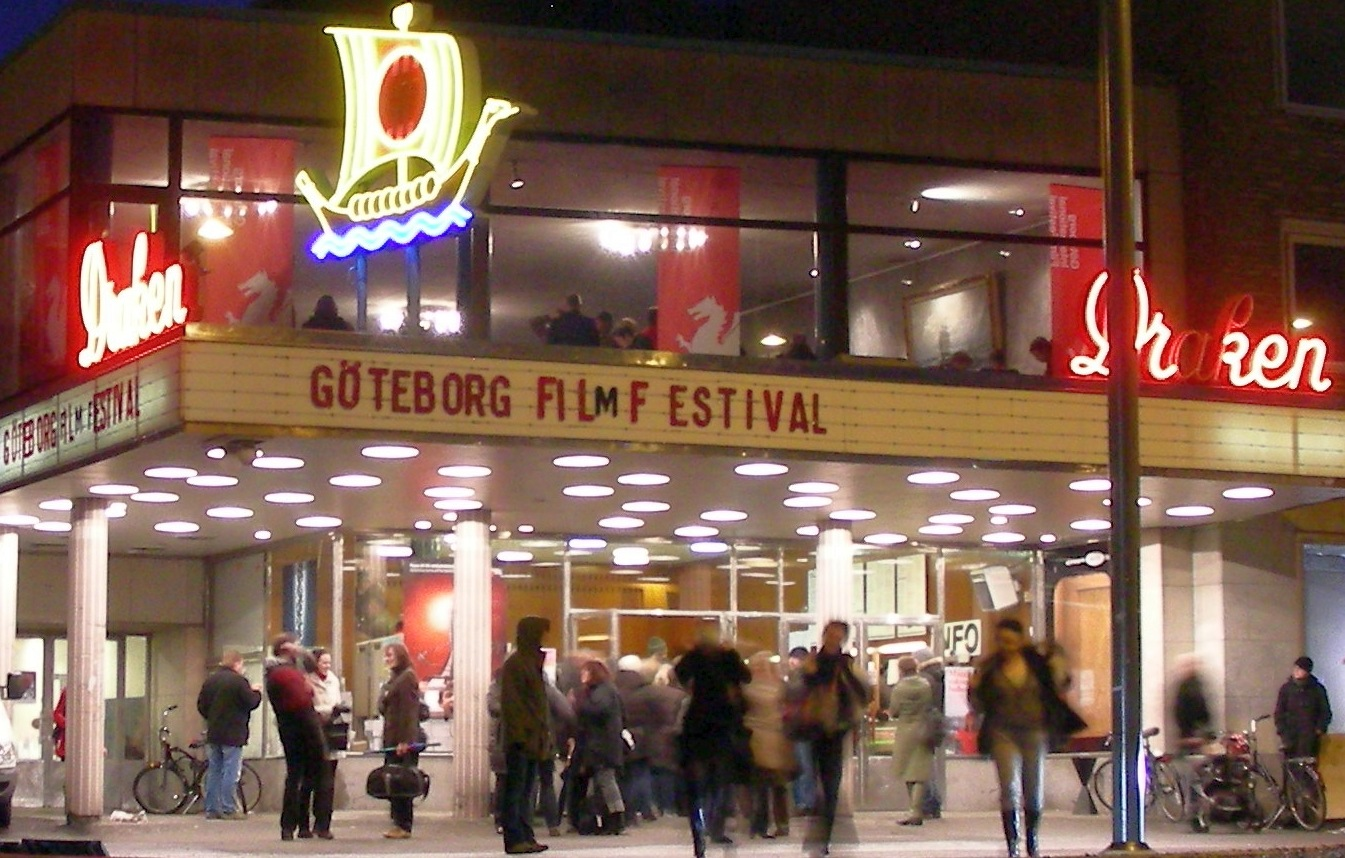 Fragment of Image:Draken, Cinema-04.JPG